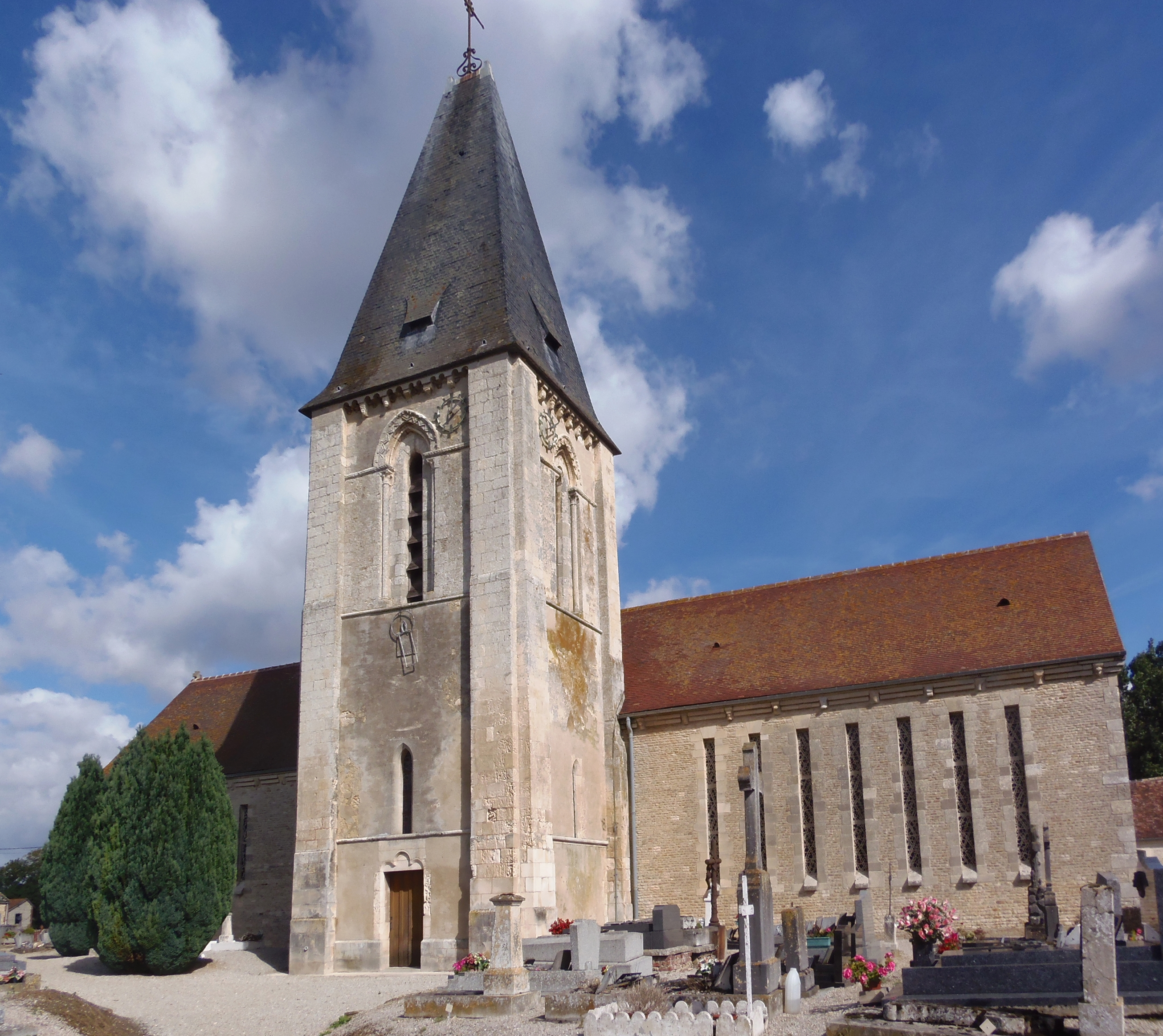 Ernes (Normandie, France). L'église Saint-Paterne.